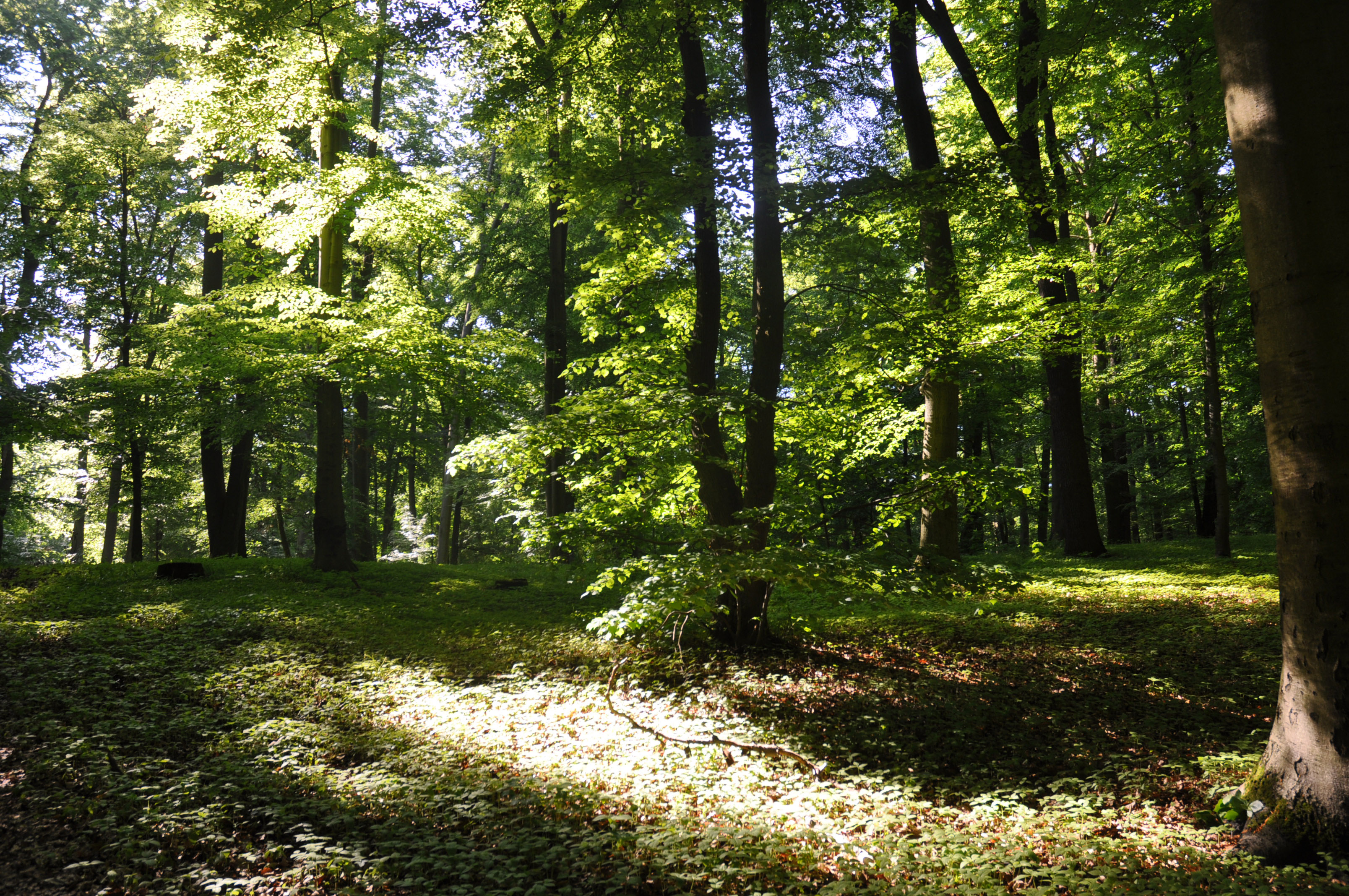 Zum Wald verwilderte östliche Parkpartie nahe dem Adjutantental